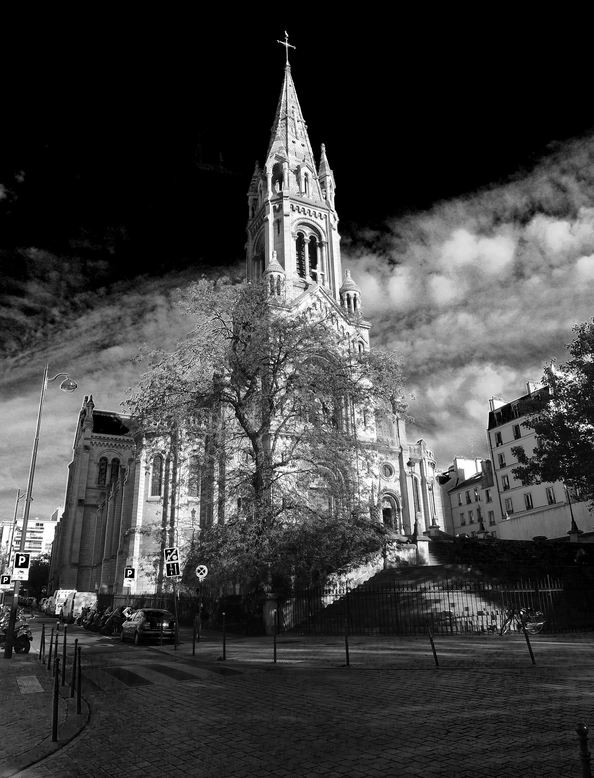 Église Notre-Dame-de-la-Croix de Ménilmontant (vue extérieure) - Paris XX